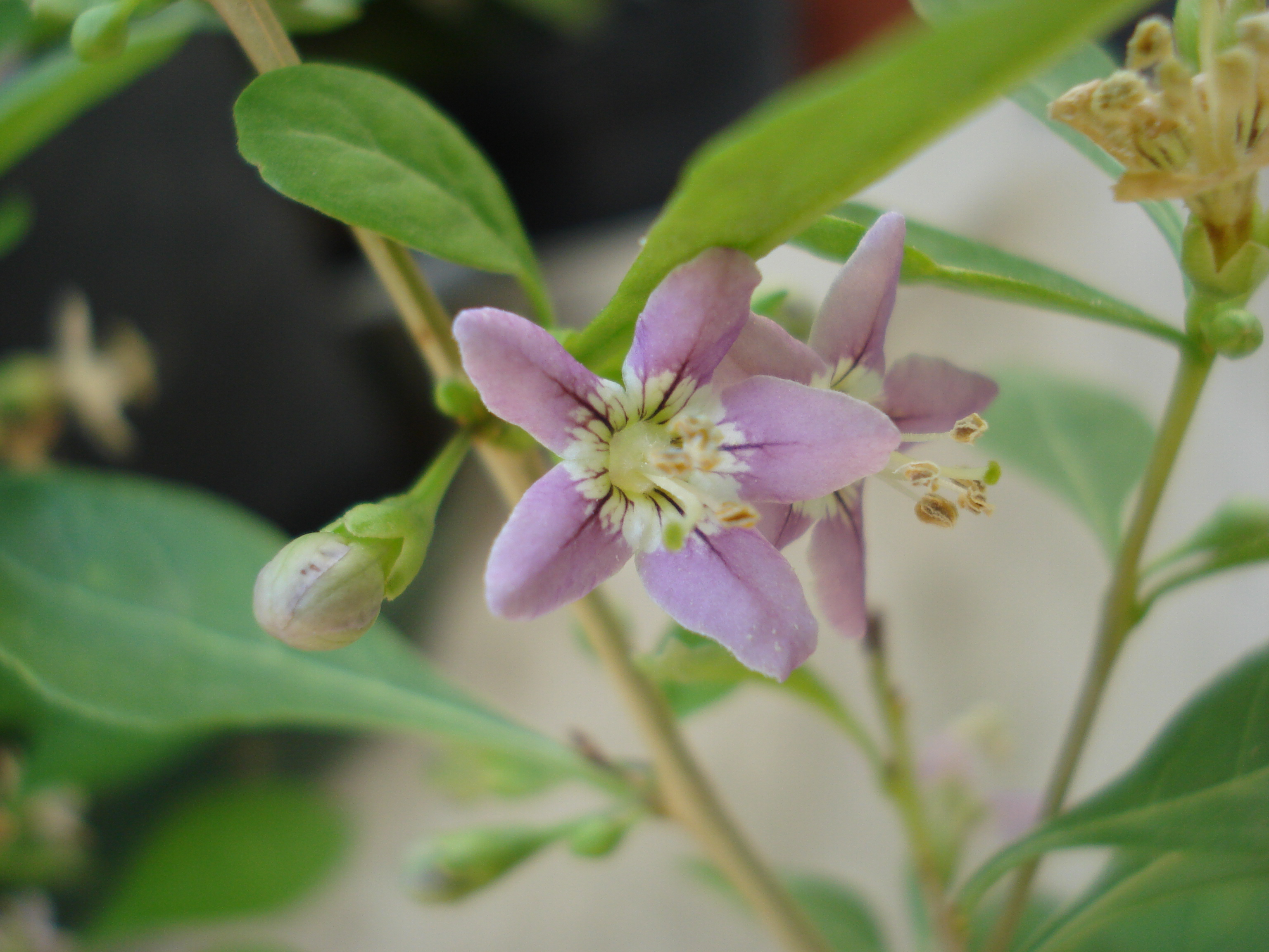 fiori di goji schiusi e in boccio